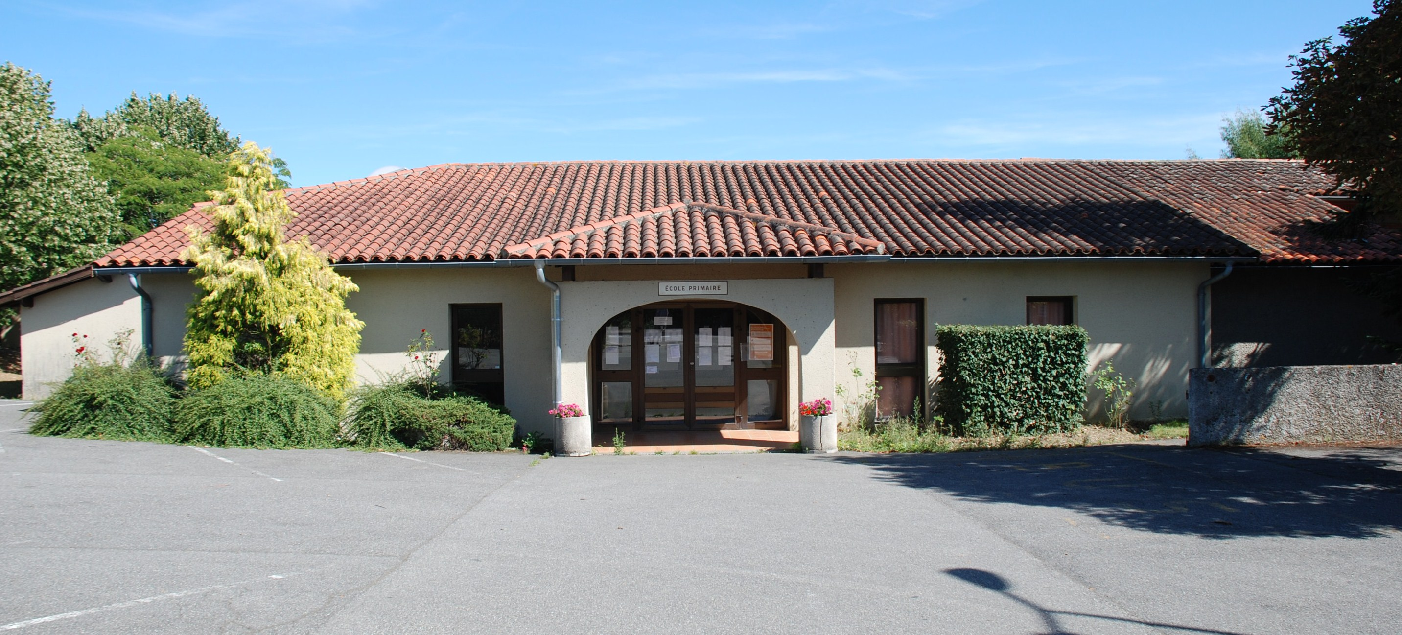 Ecole primaire de Vigoulet-Auzil